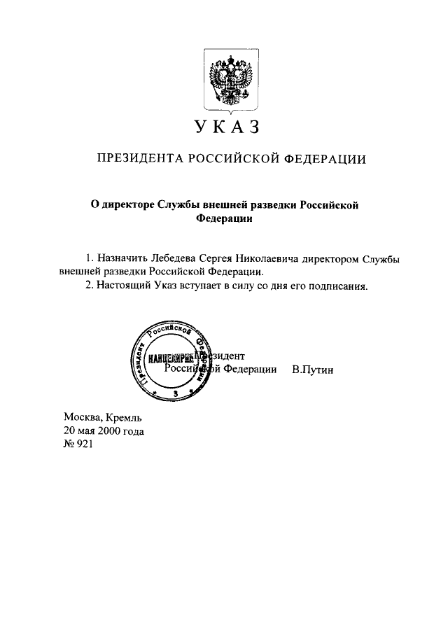 Copie scannée de l’Oukase n°921 du 20.05.2000 du président de Russie portant sur la nomination de M. Lébédev Sergueï comme Directeur du SVR